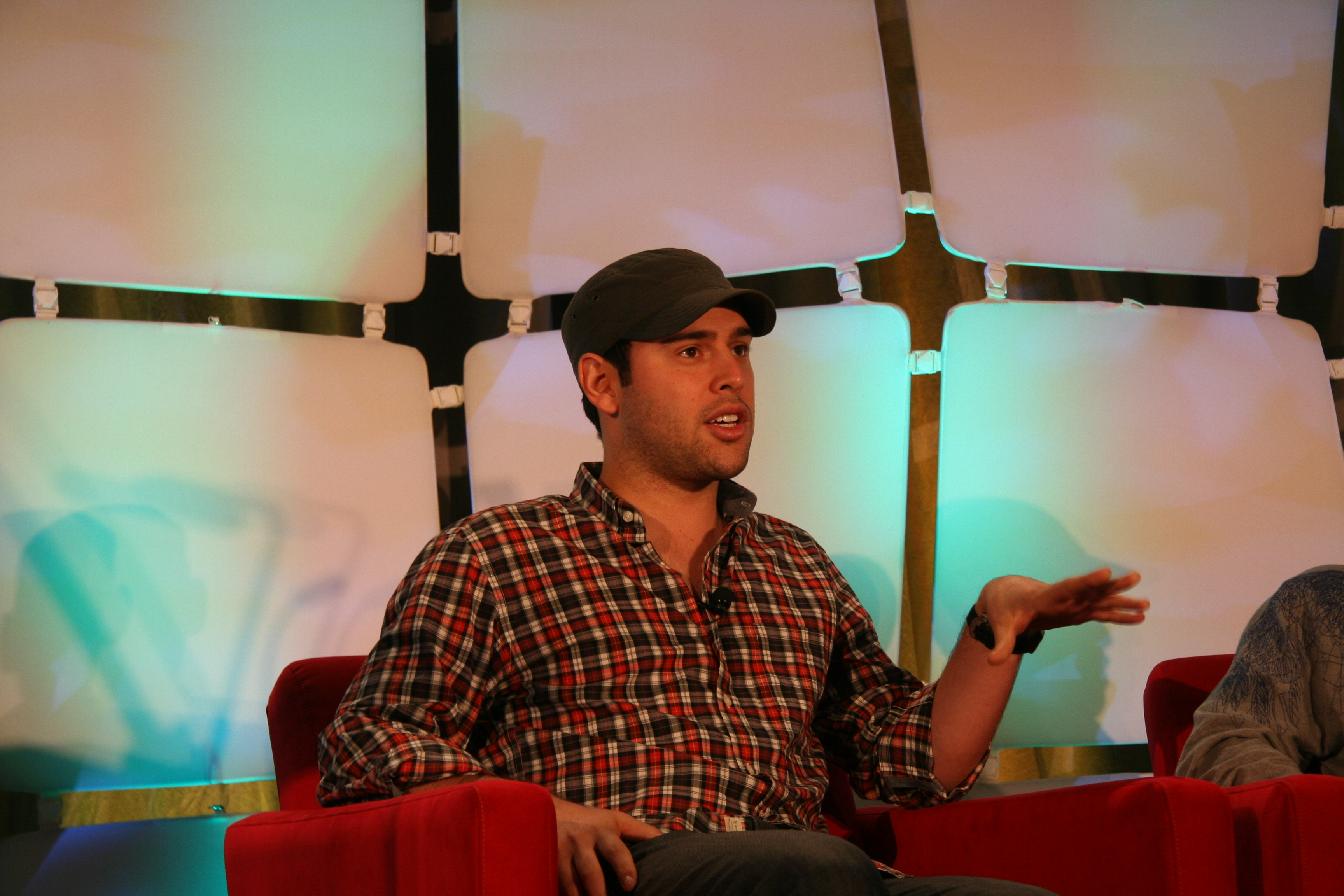 Scooter Braun on stage at Tech Crunch Disrupt in 2010.